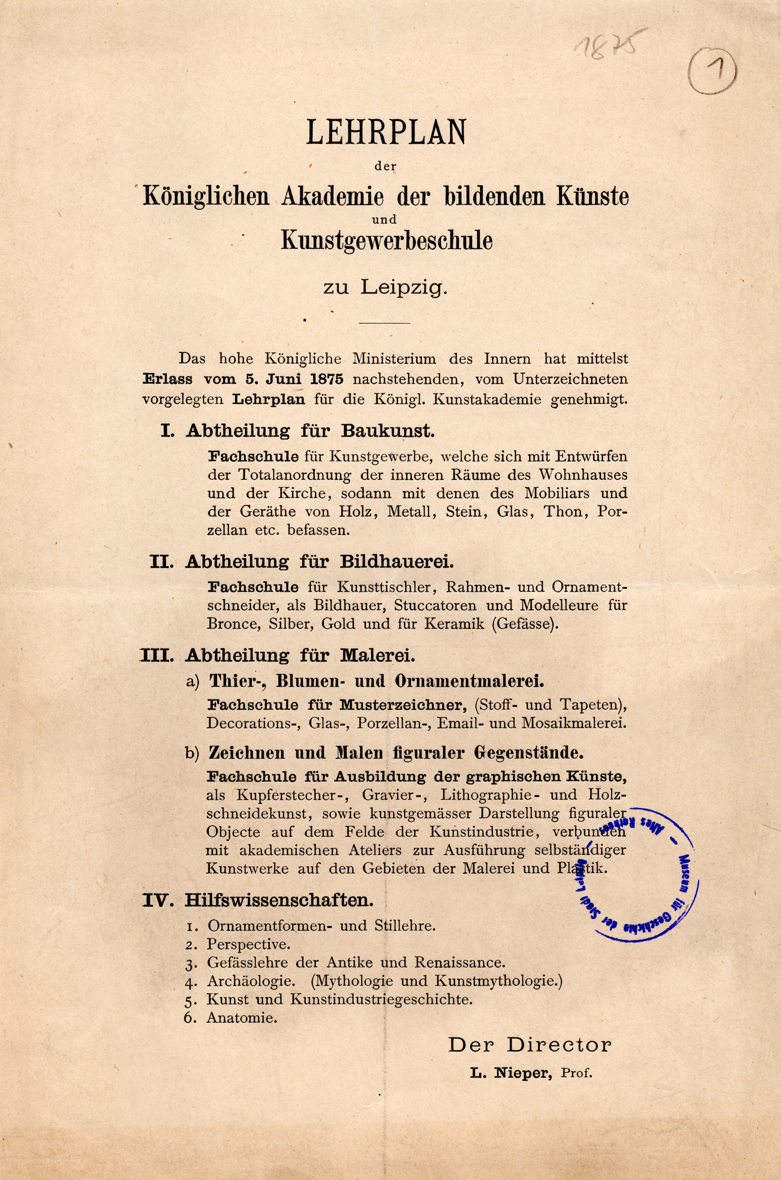 Lehrplan der Kunstakademie Leipzig, 1875